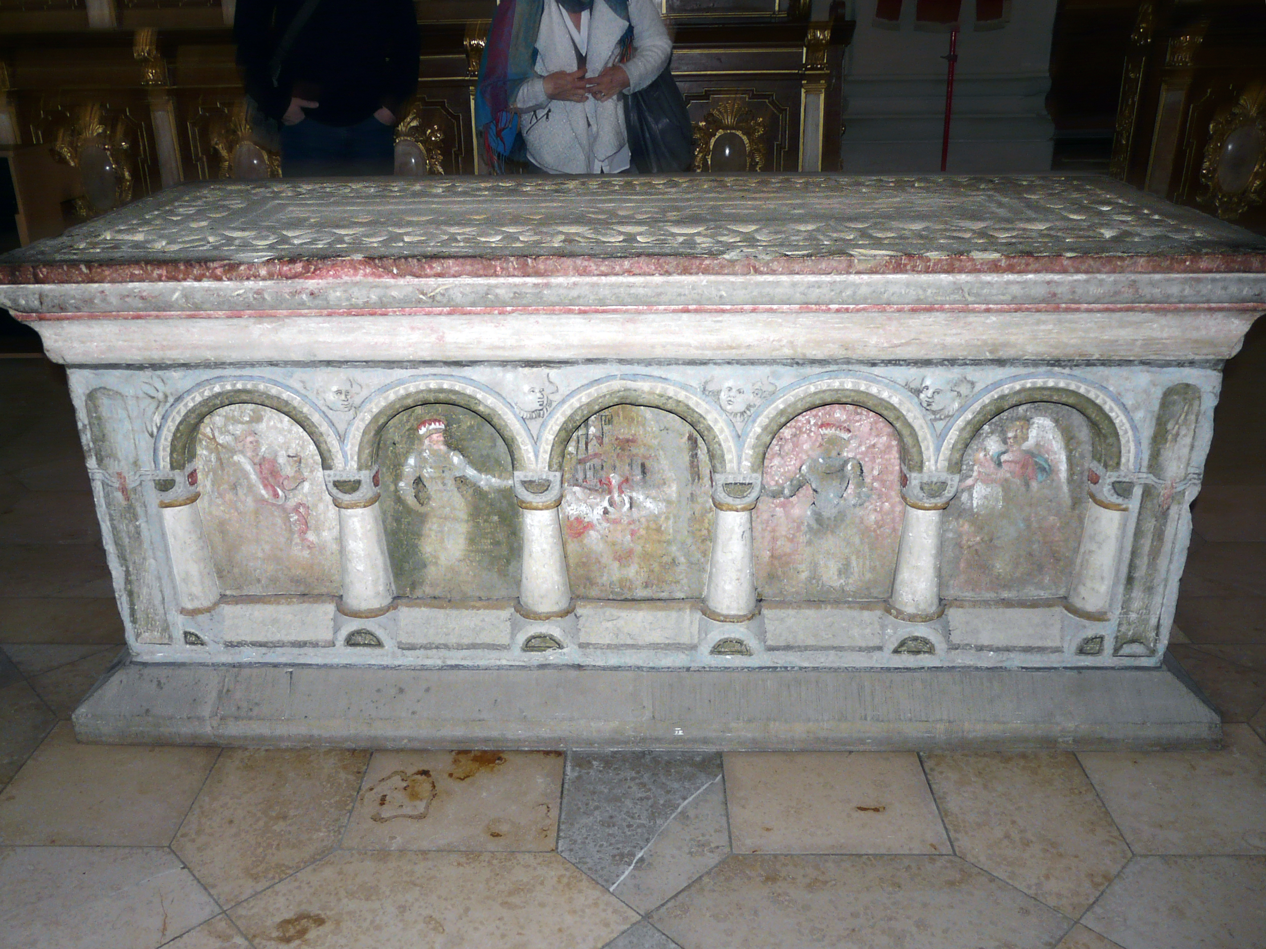 Саркофаг с прахом Вигнанда и Буркхарда